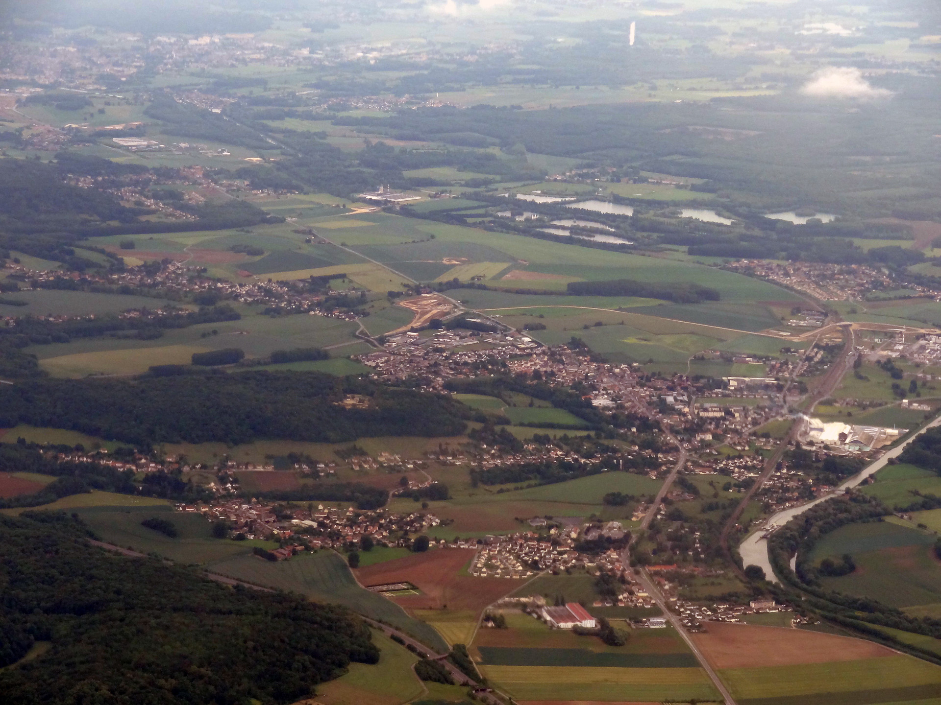 Vue aérienne de Ribécourt-Dreslincourt (Oise), France.